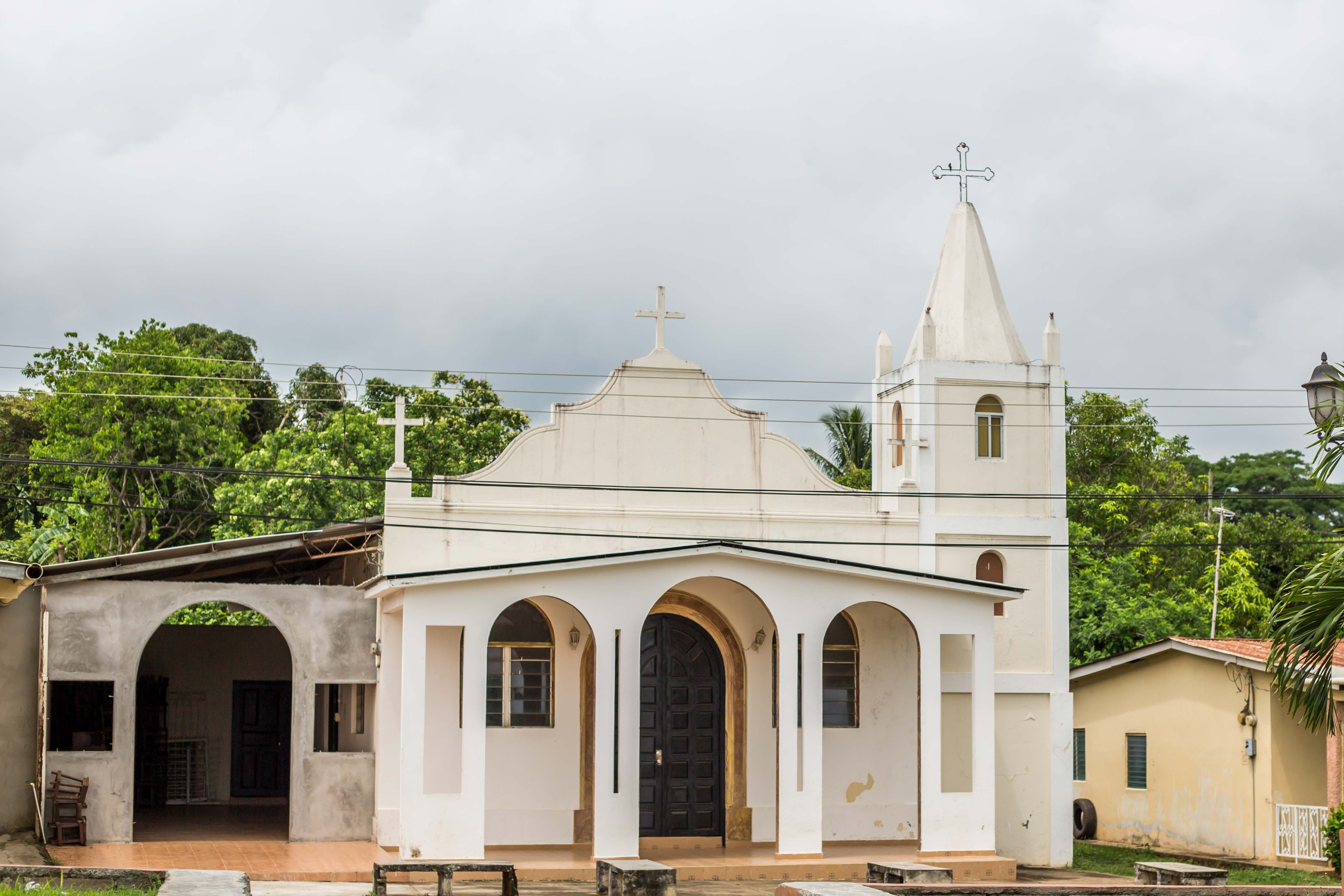 Fotografía de la actual Iglesia San Isidro Labrador de Llano Largo de Los Santos, donde se celebrar sus festividades religiosas el 15 de mayo de cada año.